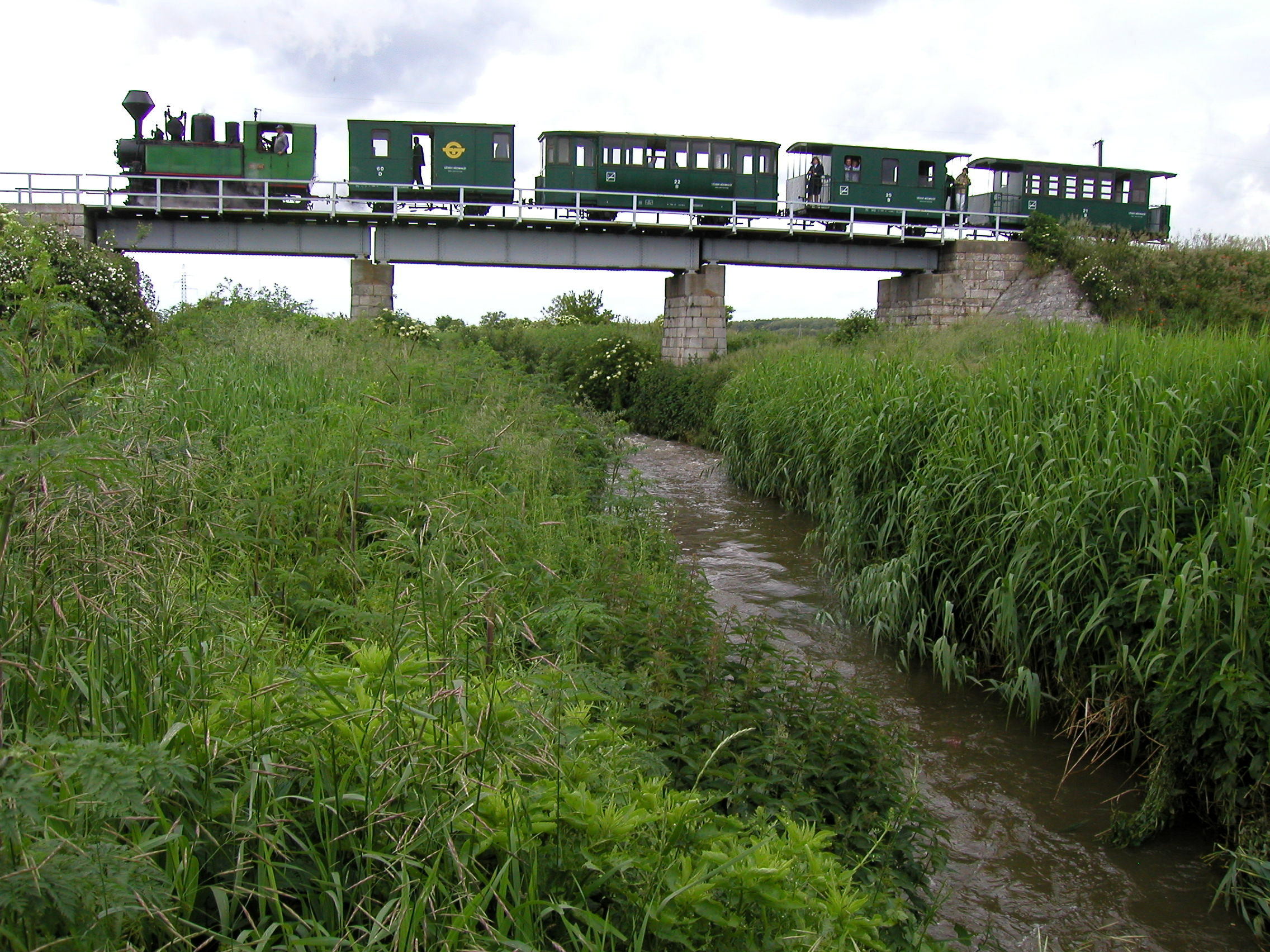 Széchenyi-Museumsbahn